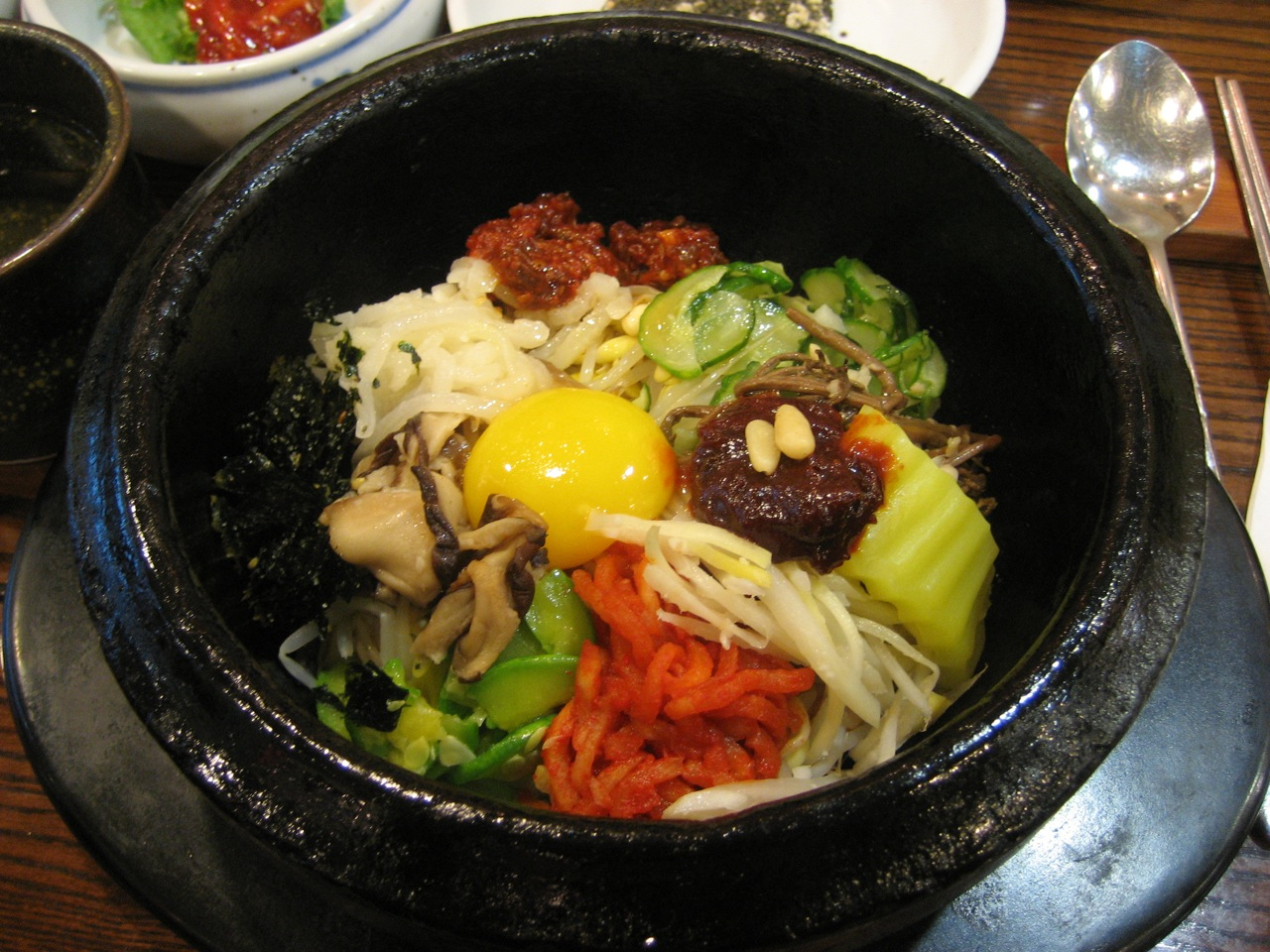 Bibimbap, a Korean dish